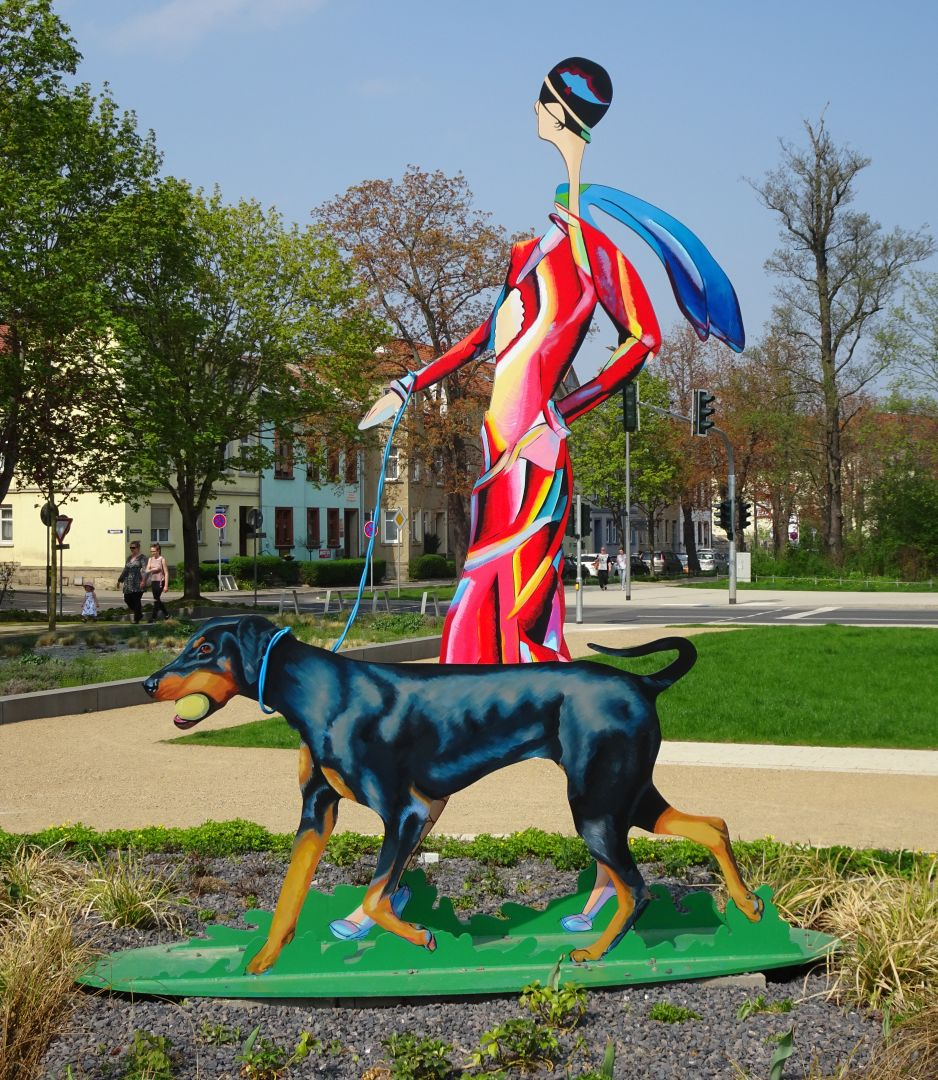 Gartenbauausstellung Apolda, am Lohteich